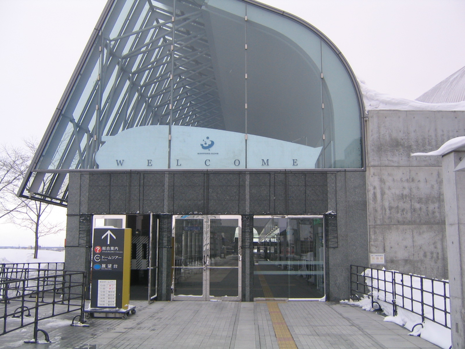 Sapporo Dome